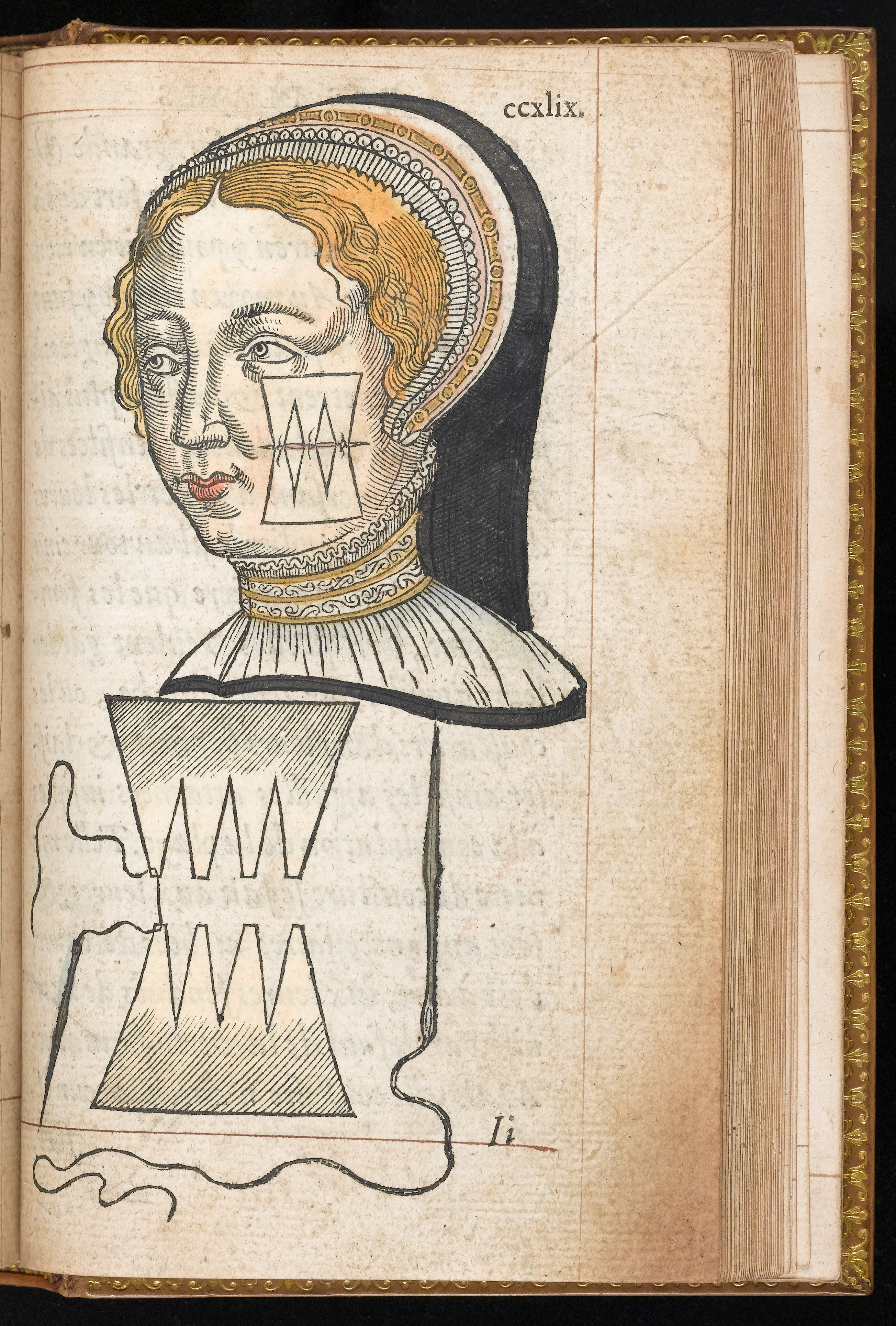 Hand coloured illustration of facial surgery "La methode curative des playes, et fractures de la teste humaine. : Avec les pourtraits des instruments necessaires pour la curation d'icelles", Ambroise Pare Rare Books Keywords: Surgery; Ambroise Paré; Surgical Instruments; General Surgery; Wounds and Injuries